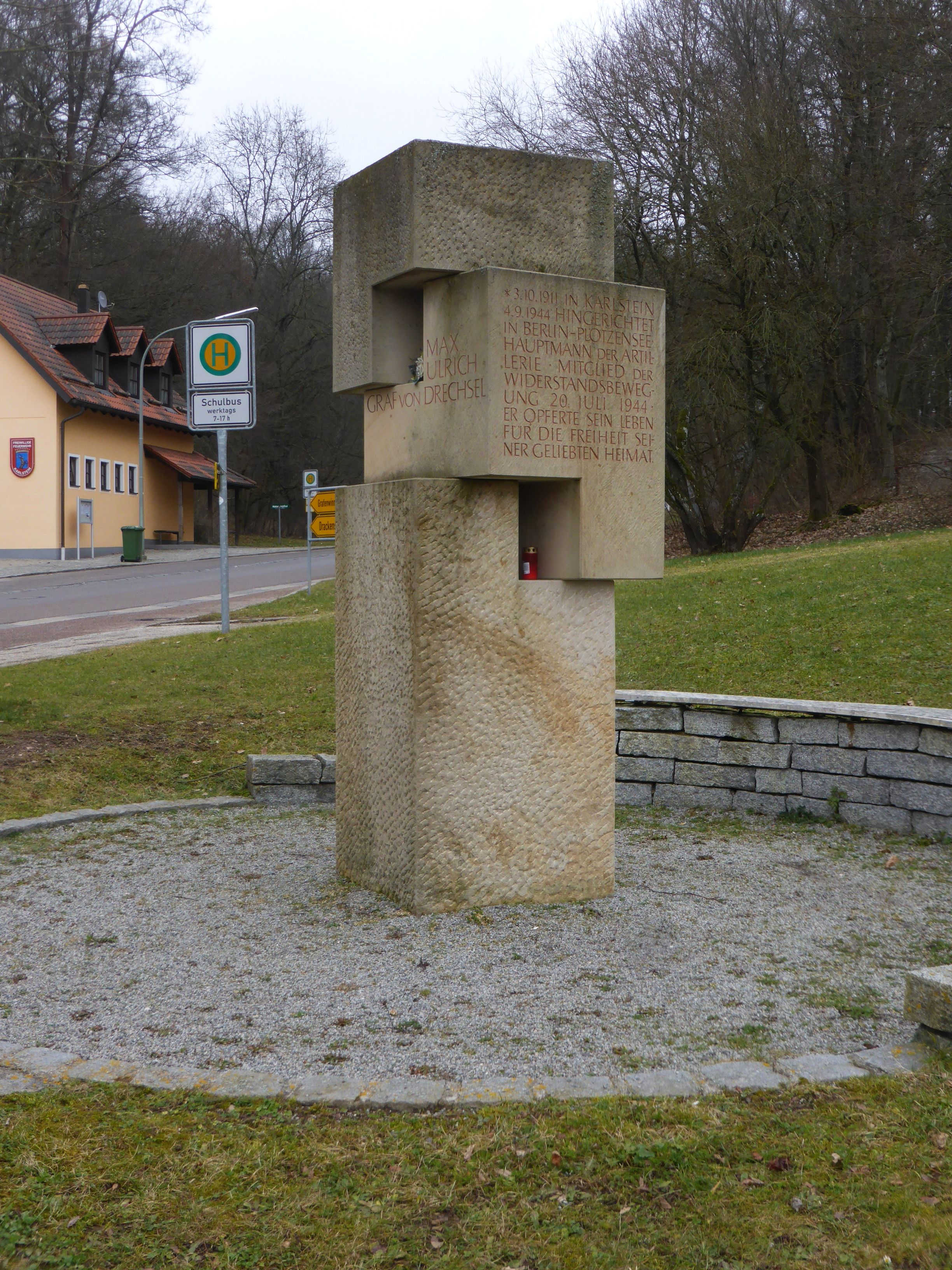 Schloss Karlstein (Regenstauf) - Denkmal für Max Ulrich von Drechsel